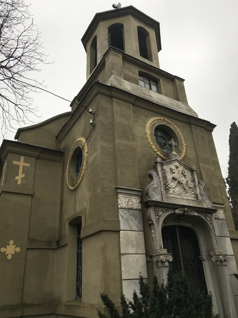 „Свети Димитър“ е български православен храм в Цариград, построен през 1919-1921 година в българското православно гробище в квартал Ферекьой (Feriköy) на ул. Yay Meydan cd. 47. (координати: 41°02′55.6″N 28°58′25.7″E)